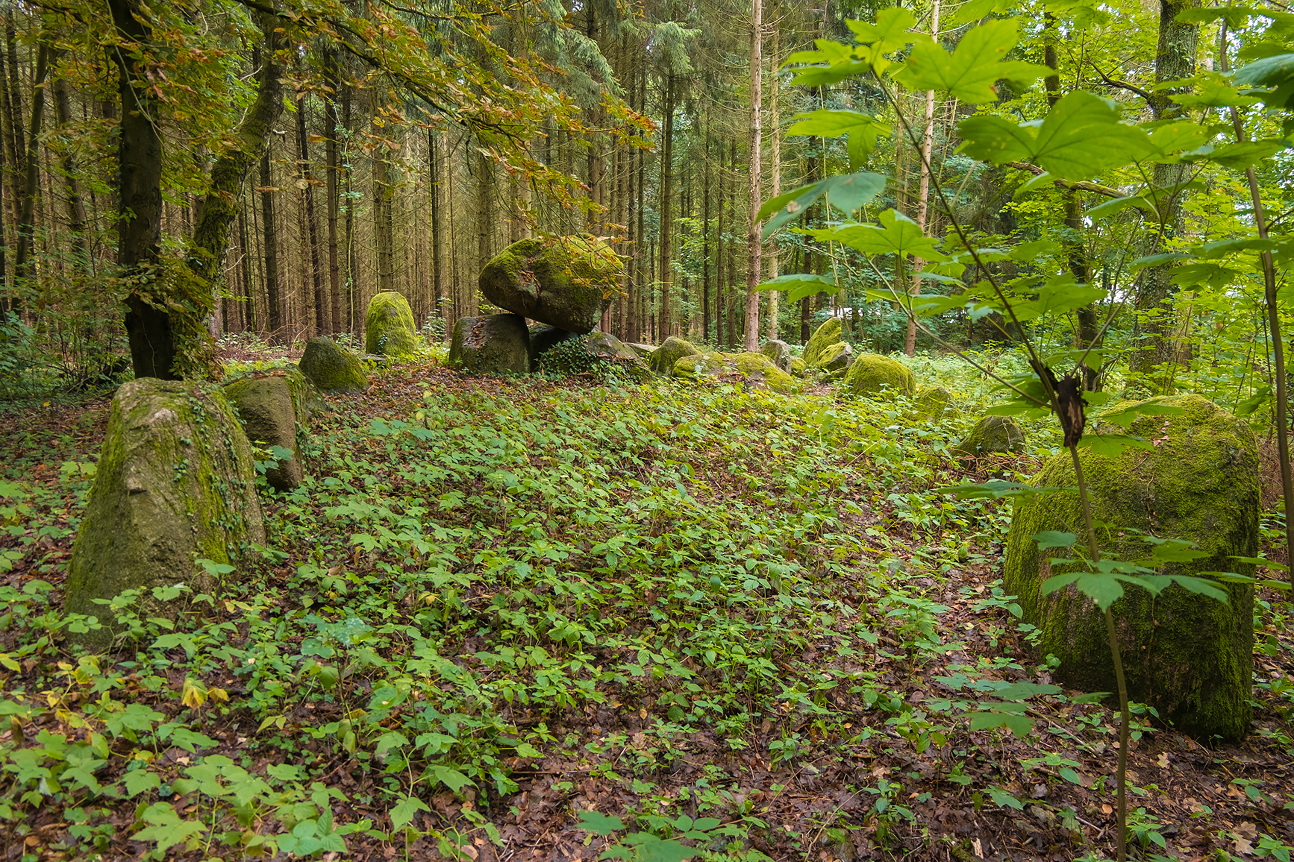 Erweiterter Dolmen der neolithischen Trichterbecherkultur bei Stuer in Mecklenburg-Vorpommern